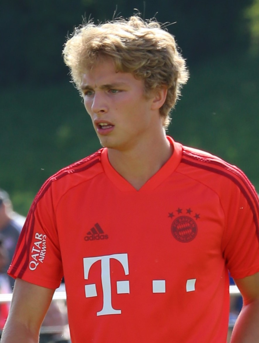 Fiete Arp, am 1. September 2019 beim Training auf dem Gelände des FC Bayern München